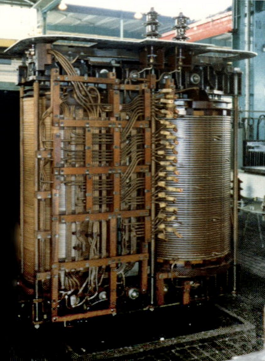 Trafo ohne Verkleidung